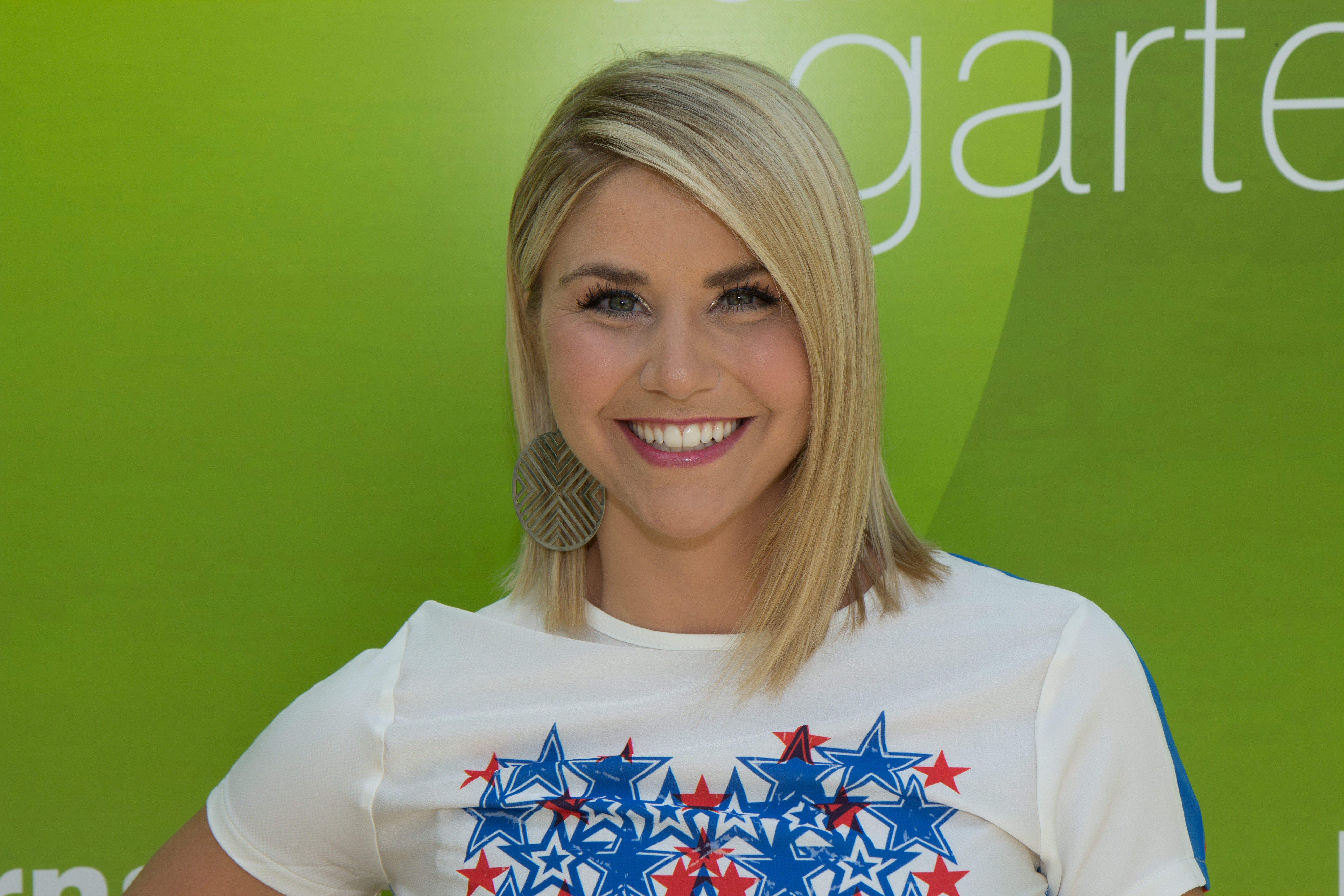 Beatrice Egli als Gast beim ZDF-Fernsehgarten am 21. Mai 2018 in Mainz.